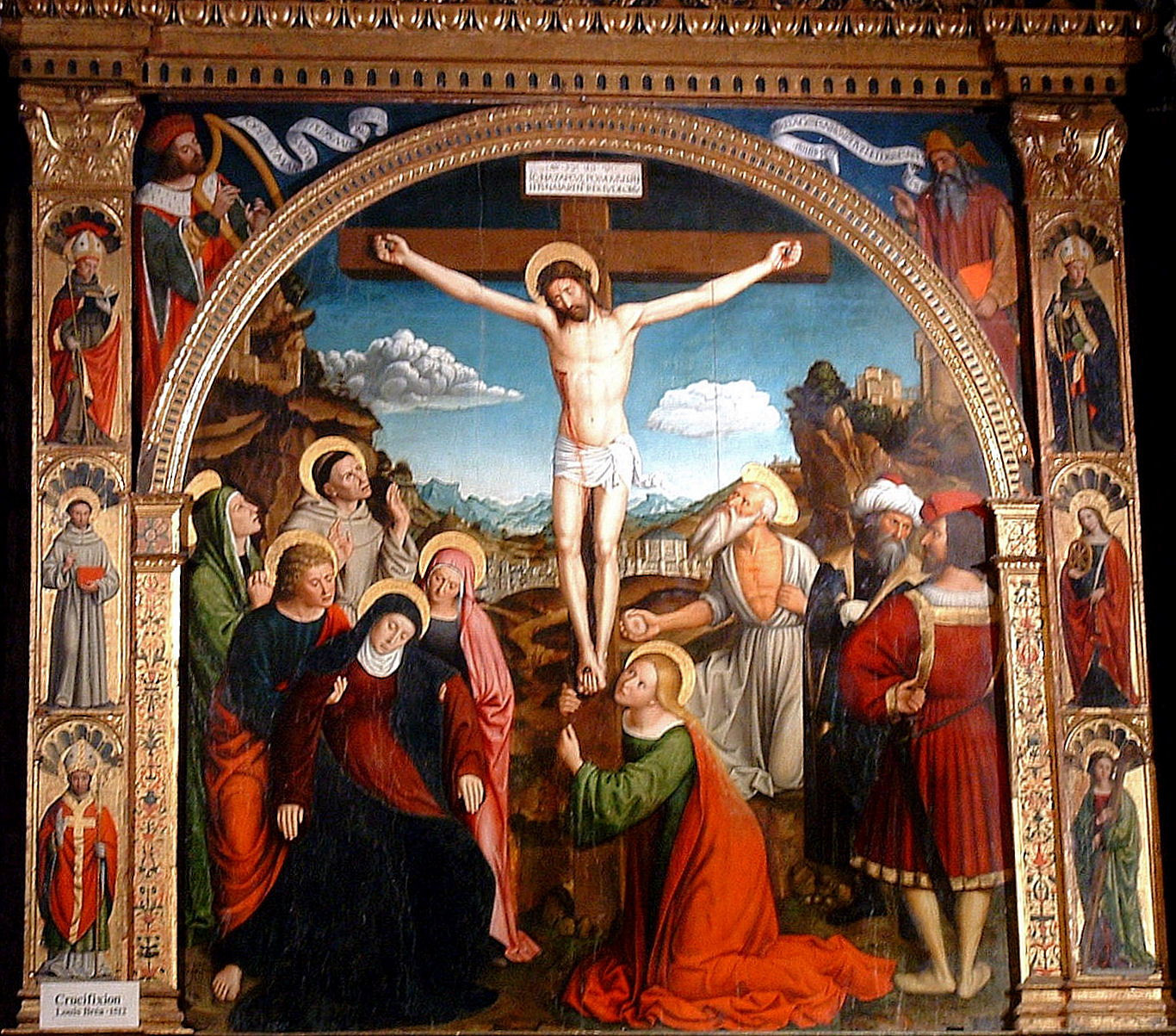 Monastère de Cimiez - Louis Bréa - Crucifixion - 1512